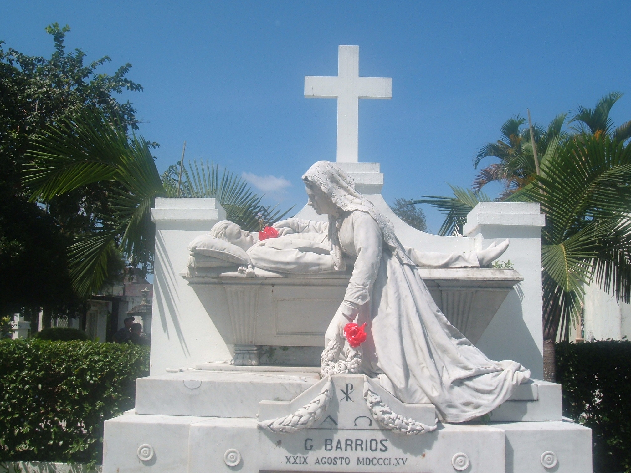 Gerardo Barrios' tomb(salvadorean patriot), in Cementerio de los Ilustres in San Salvador,El Salvador.